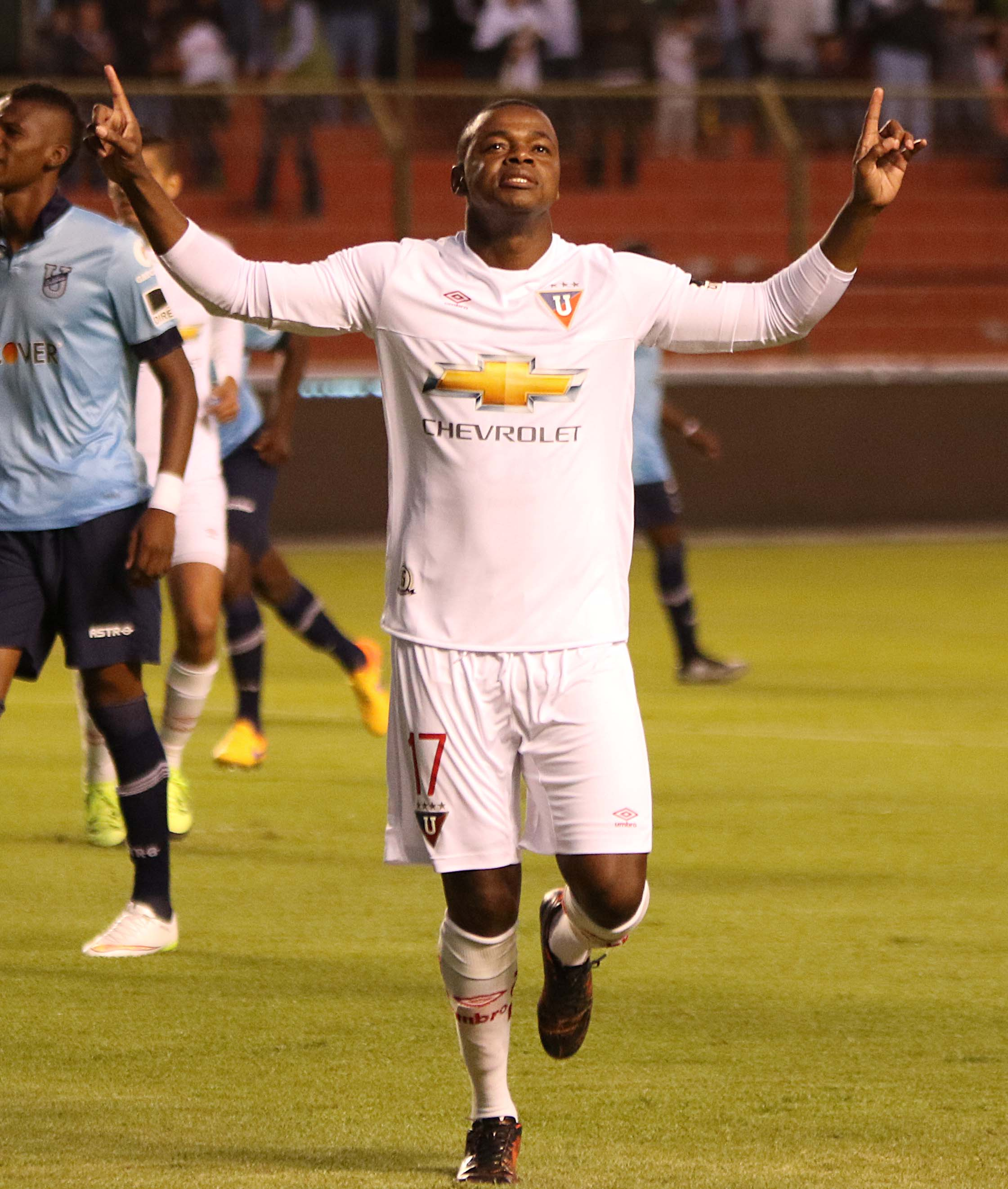 Quito, 27 de jul (Andes).- En Casa Blanca se enfrentaron los equipos de LDU de Quito (blanco) y la Católica (azul) por la segunda fecha de la segunda etapa del Campeonato Nacional de Fútbol. En la gráfica #17 Narciso Mina celebra el gol de la victoria ante la Católica. ANDES/Micaela Ayala V.